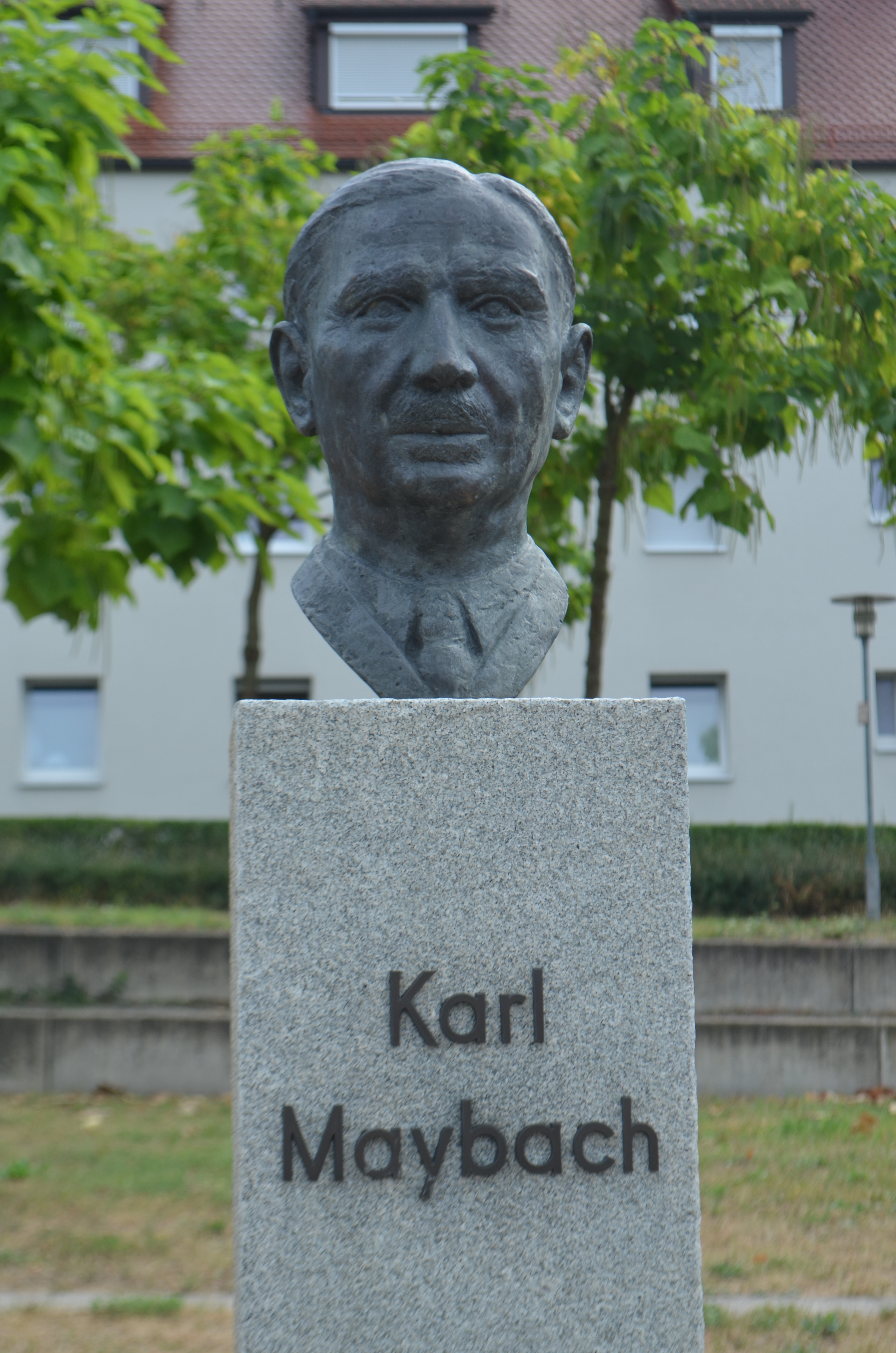 Friedrichshafen, Denkmal Karl Maybach